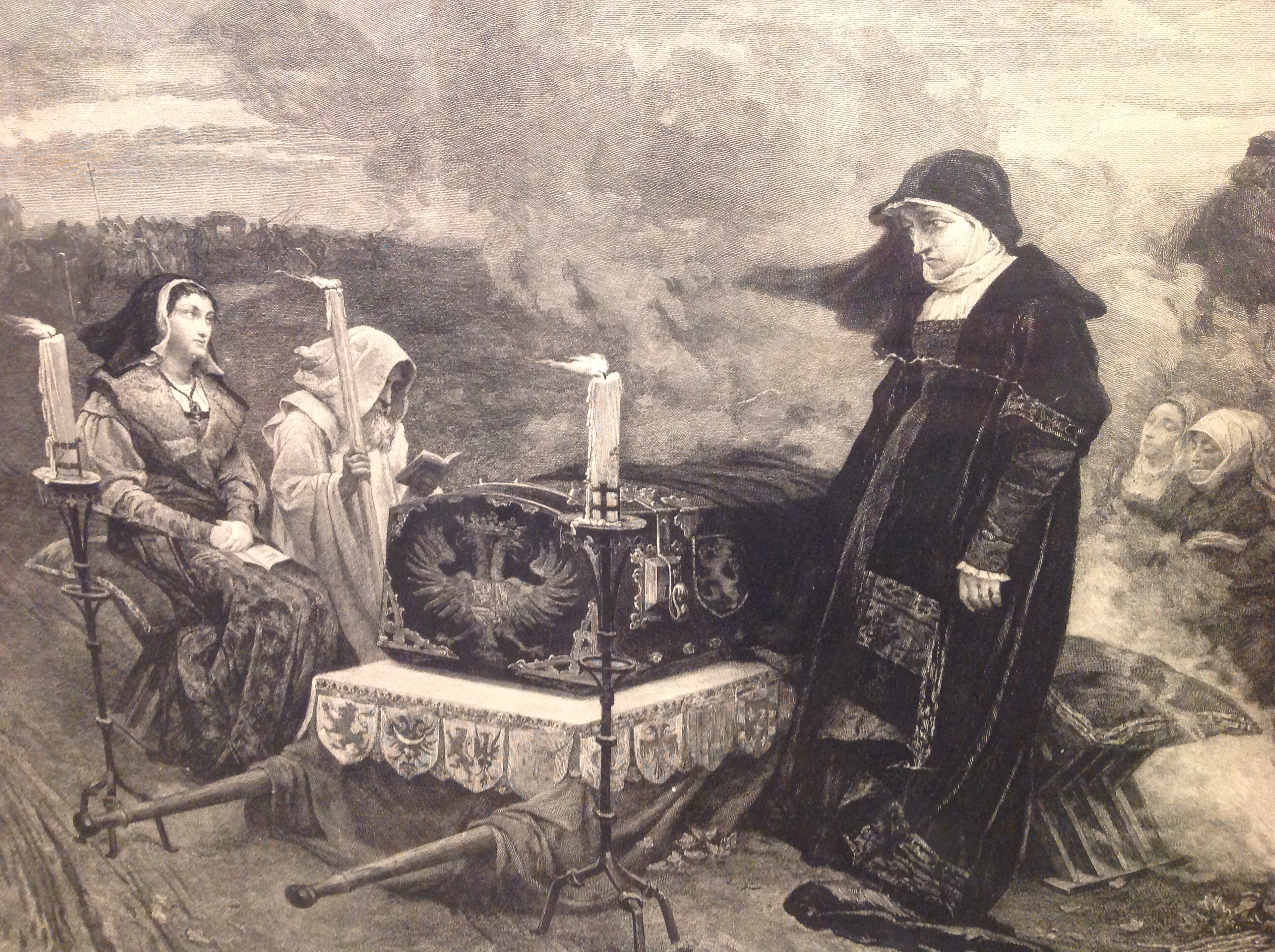 La pintura històrica de les col·leccions de BMVB- exposició temporal